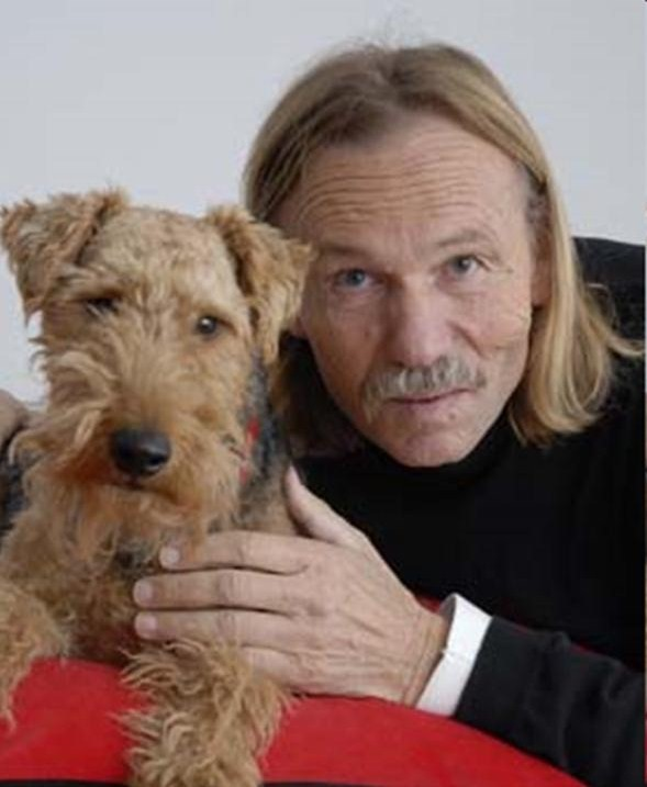 Foto Dieter Thomas mit Hund